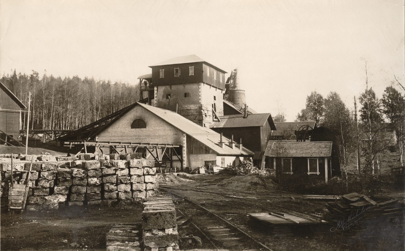 A5637. Masugnen vid Strömsdals Bruk, Dalarna.